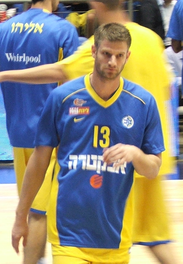 Maccabi Tel Aviv VS. Barak Netanya 31/10/11